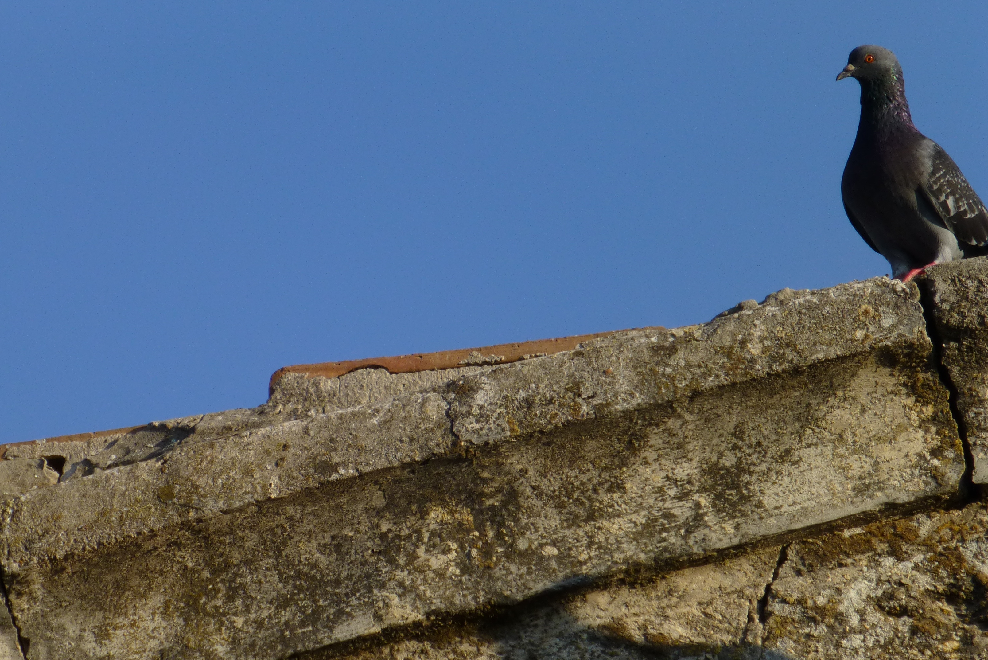 ראשוני המתיישבים באתר היישוב אלוני אבא היו בני הדור השני של תנועת הטמפלרים הגרמנים, אשר הקימו במקום בשנת 1907 מושבה חקלאית קטנה ושמה "ולדהיים".